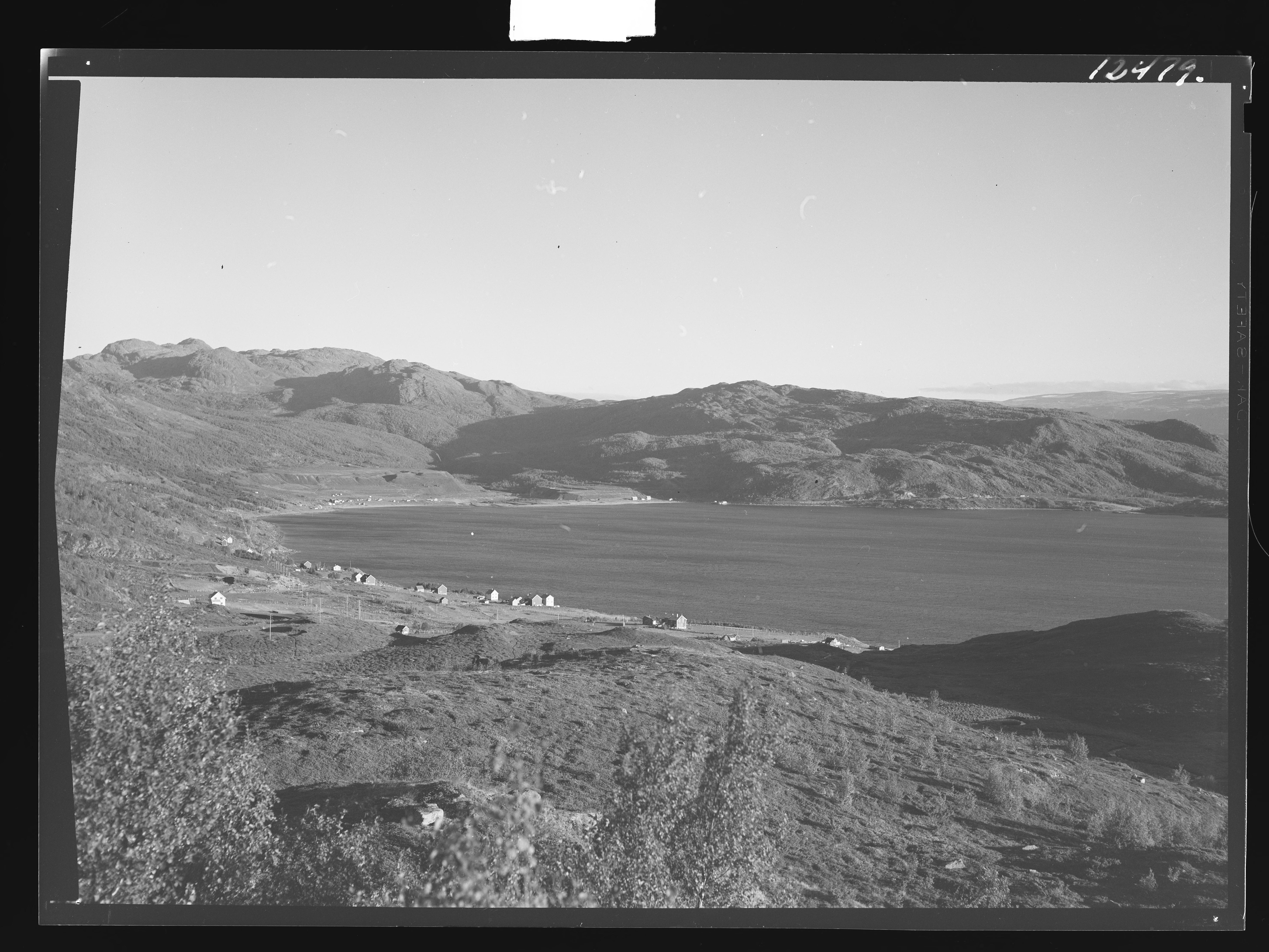 Bildet er hentet fra Nasjonalbibliotekets bildesamling. Anmerkninger til bildet var: Fotograf:Ukjent Badderen,Badderfjorden, Kvænangen, Troms